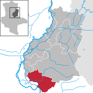 Gommern im Landkreis Jerichower Land, Sachsen-Anhalt